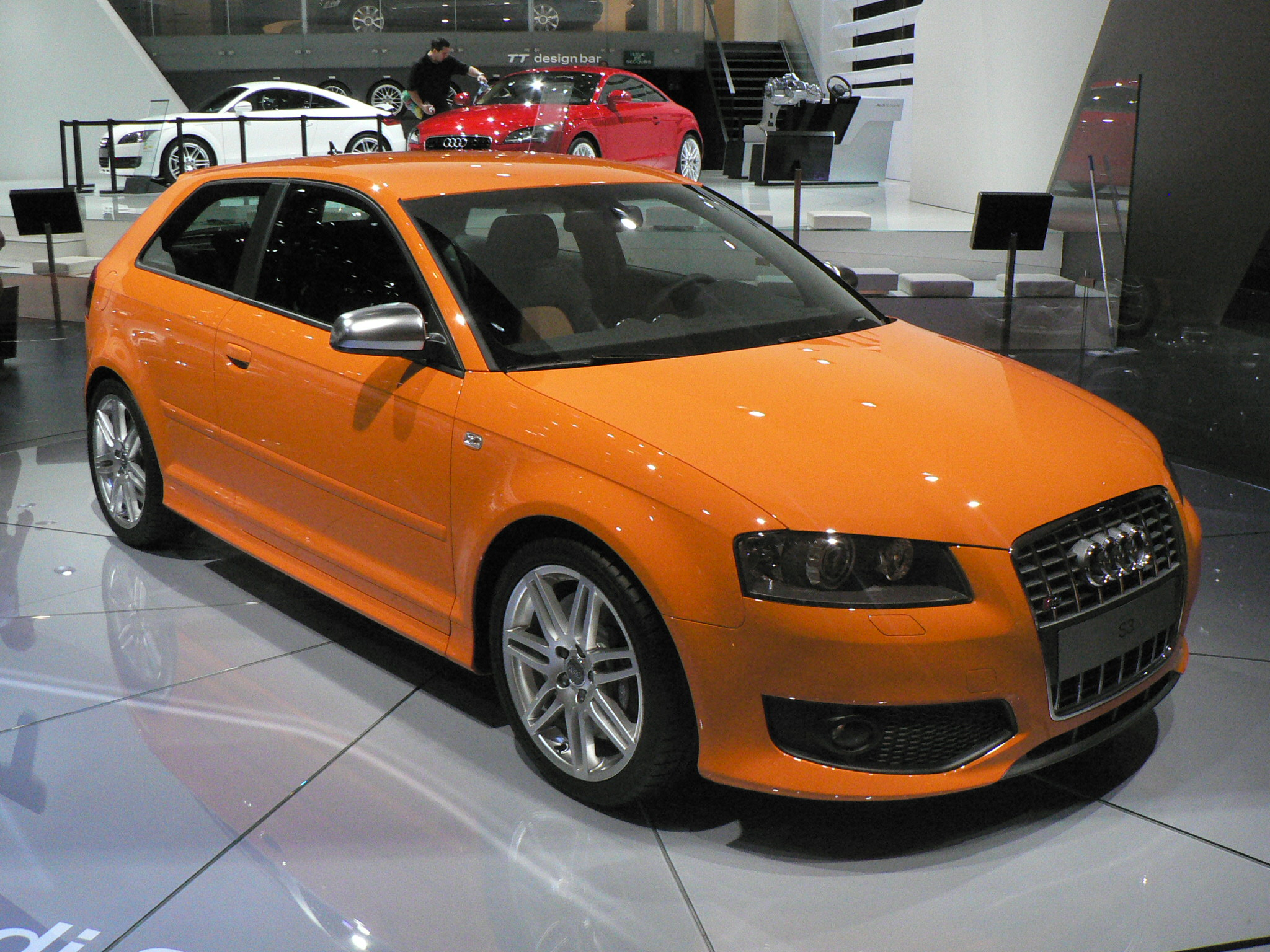 Mondial de l'automobile, Paris 2006